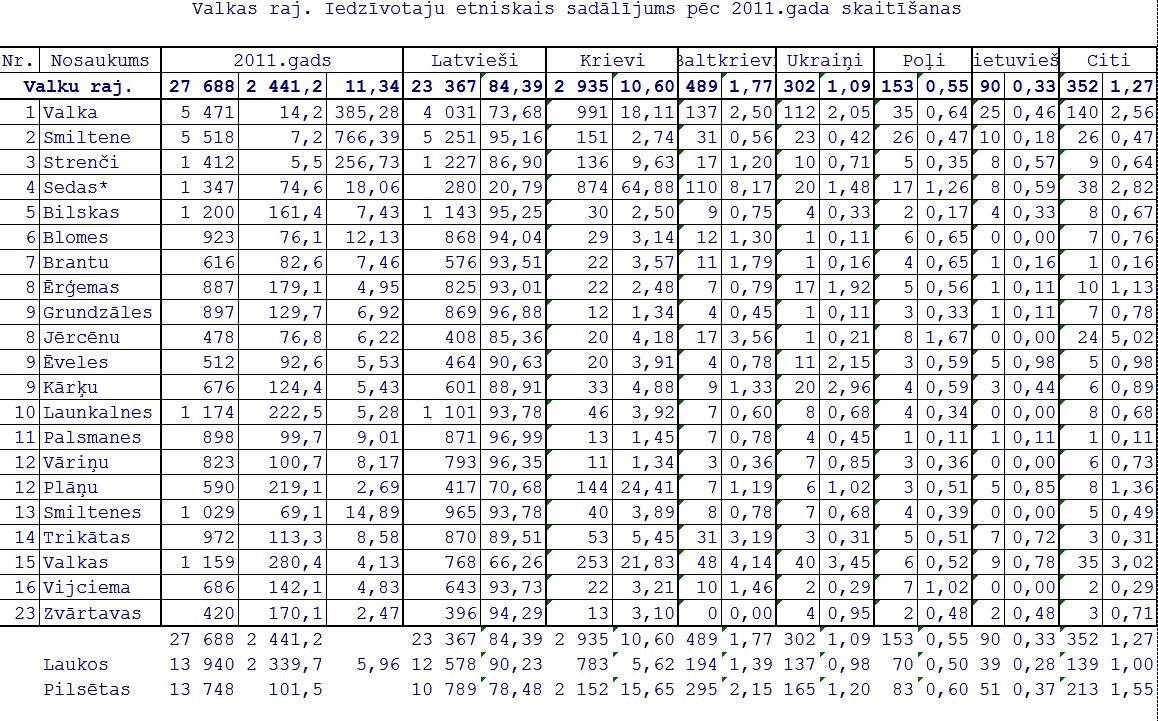 Latvijas 2011 gada tautas skaitīšanas dati